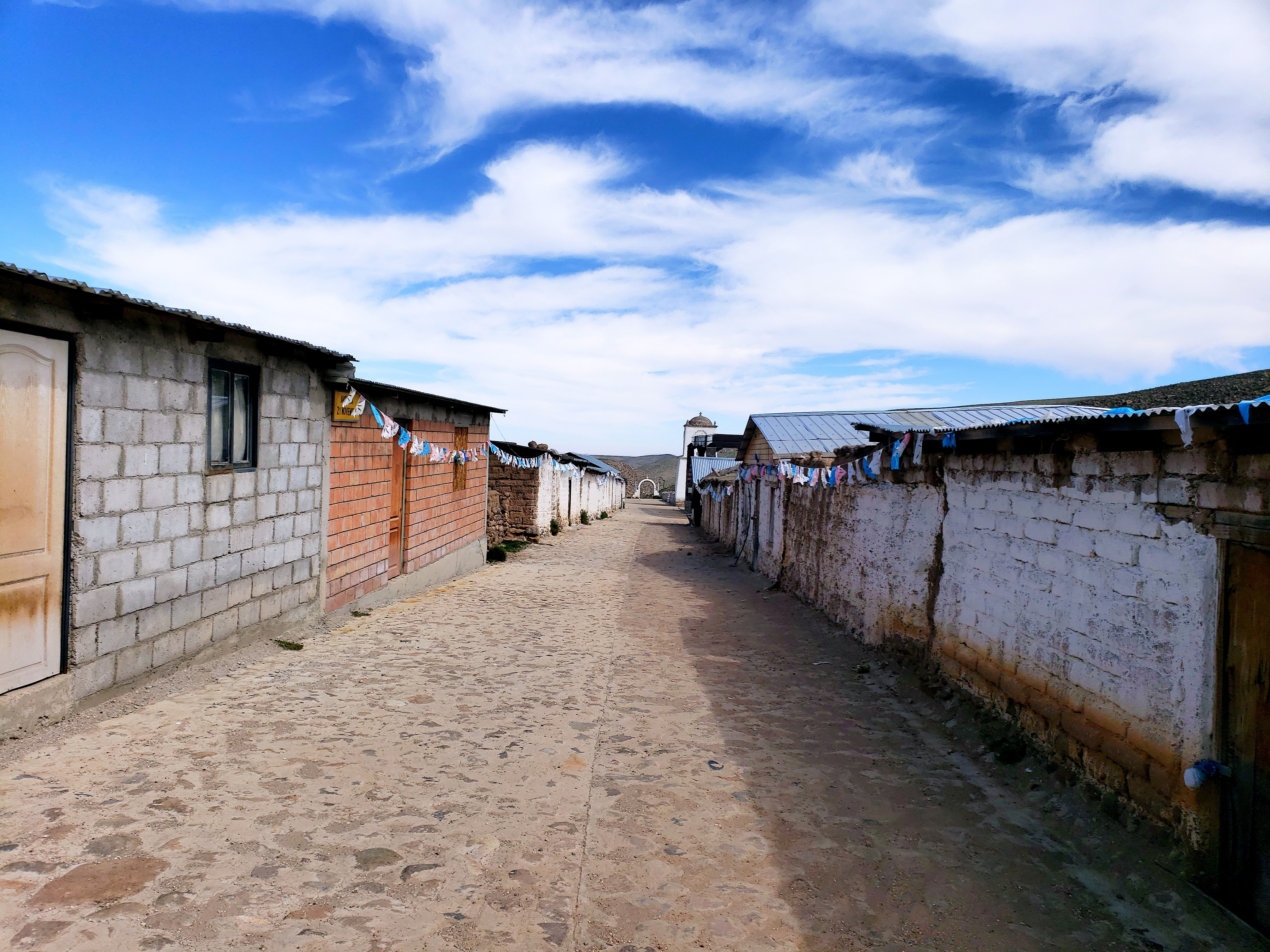 Fotografía emitida Octubre 2019 del sector "este" del poblado de Timalchaca a pasos del Santuario de dicha localidad.